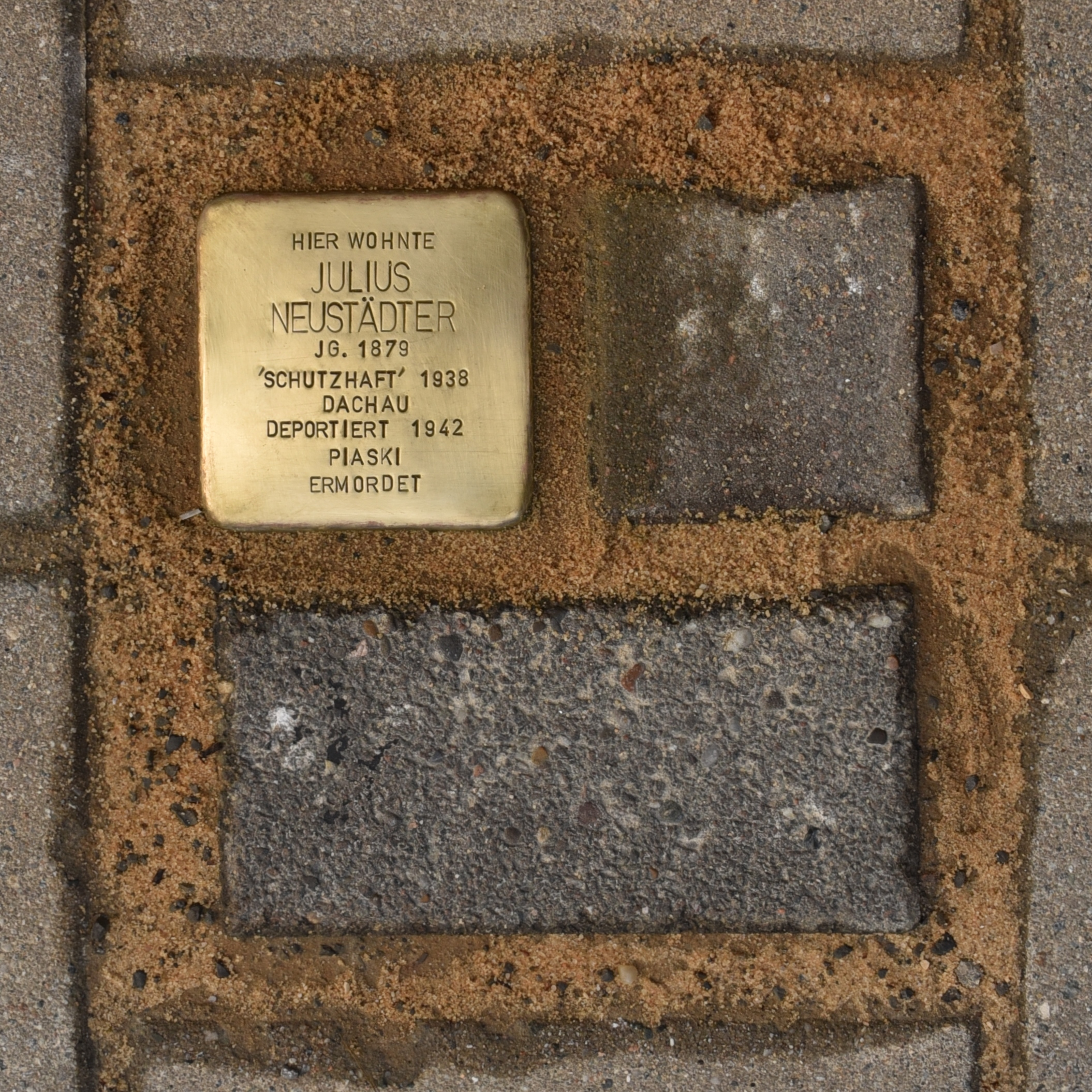 Stolpersteine in Neumarkt in der Oberpfalz mit Platzhalter